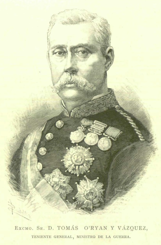 Excmo. Sr. D. Tomás O'Ryan y Vázquez, Teniente General, Ministro de la Guerra.